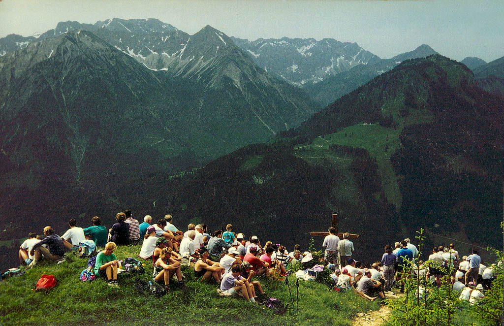 Bergmesse auf dem Hirschberg bei Bad Hindelang im Juli 1994